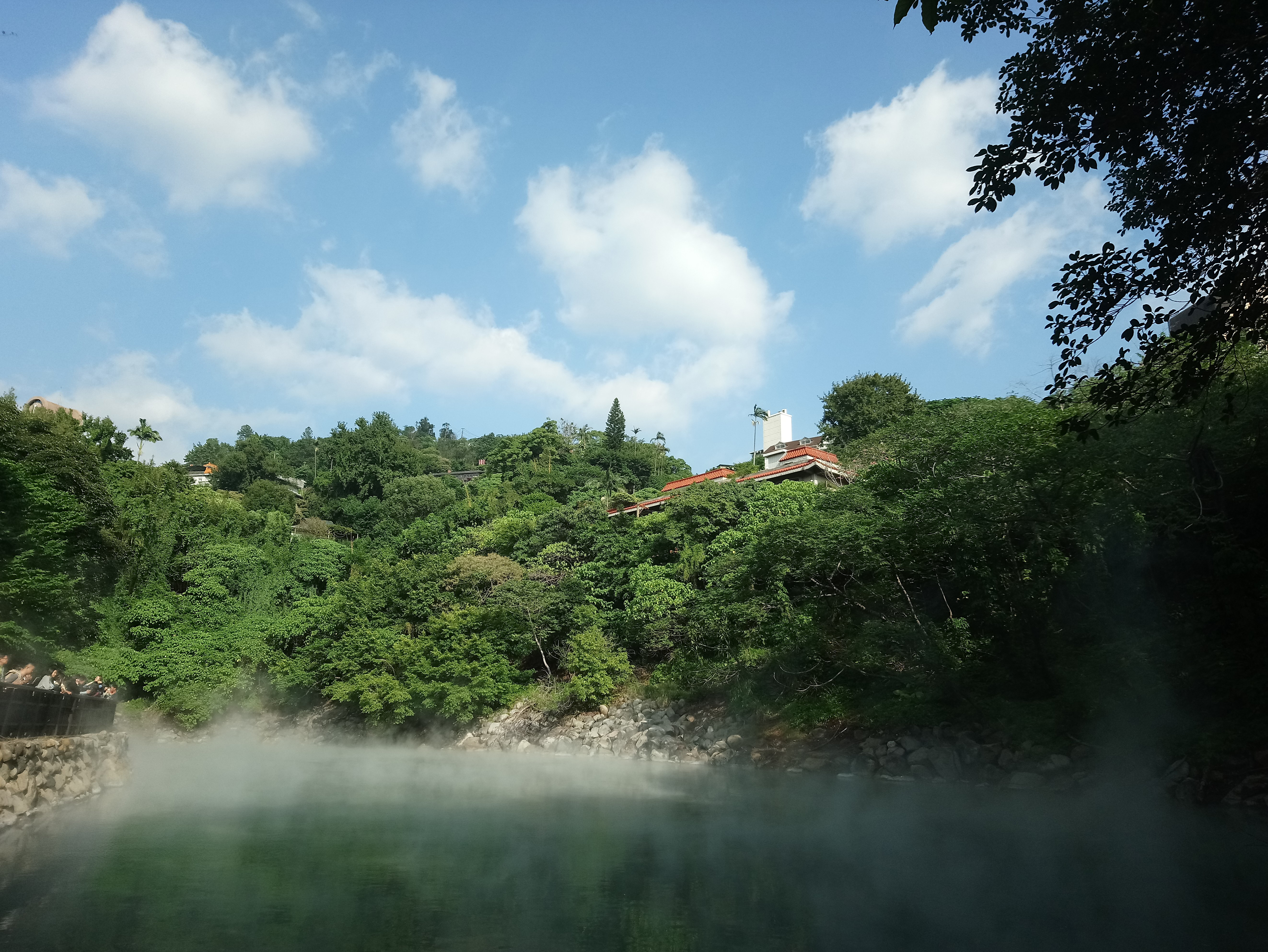 地熱谷,臺北市北投區新北投次分區林泉里